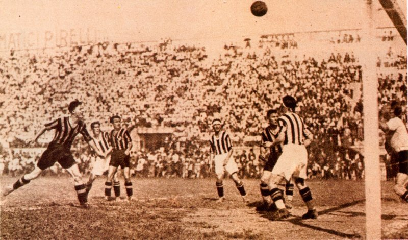 Campionato 1929/30 – XXIII° giornata. Inter - Juventus 2-0